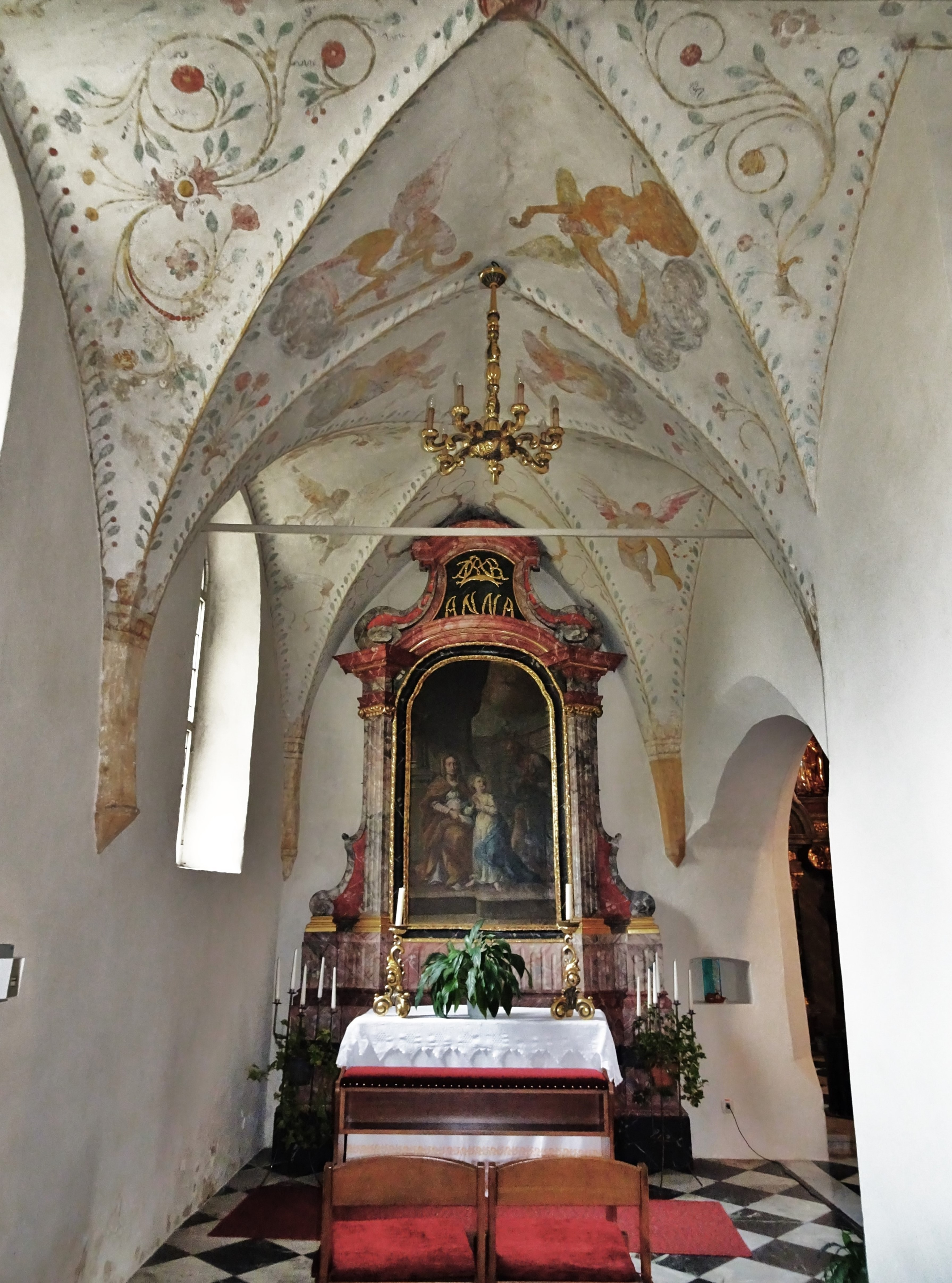 Kath. Pfarrkirche Zu Unserer Lieben Frau Maria Gail, Innenansicht der Annakapelle